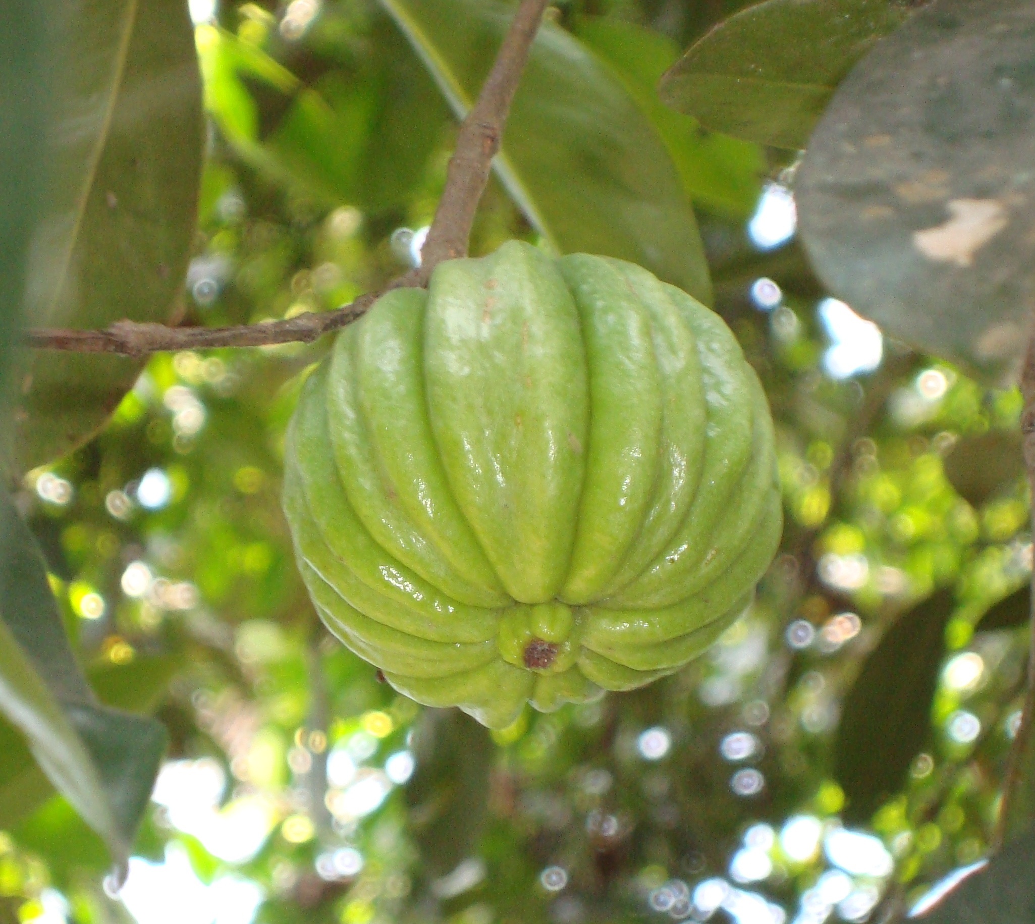 കുടപ്പുളി